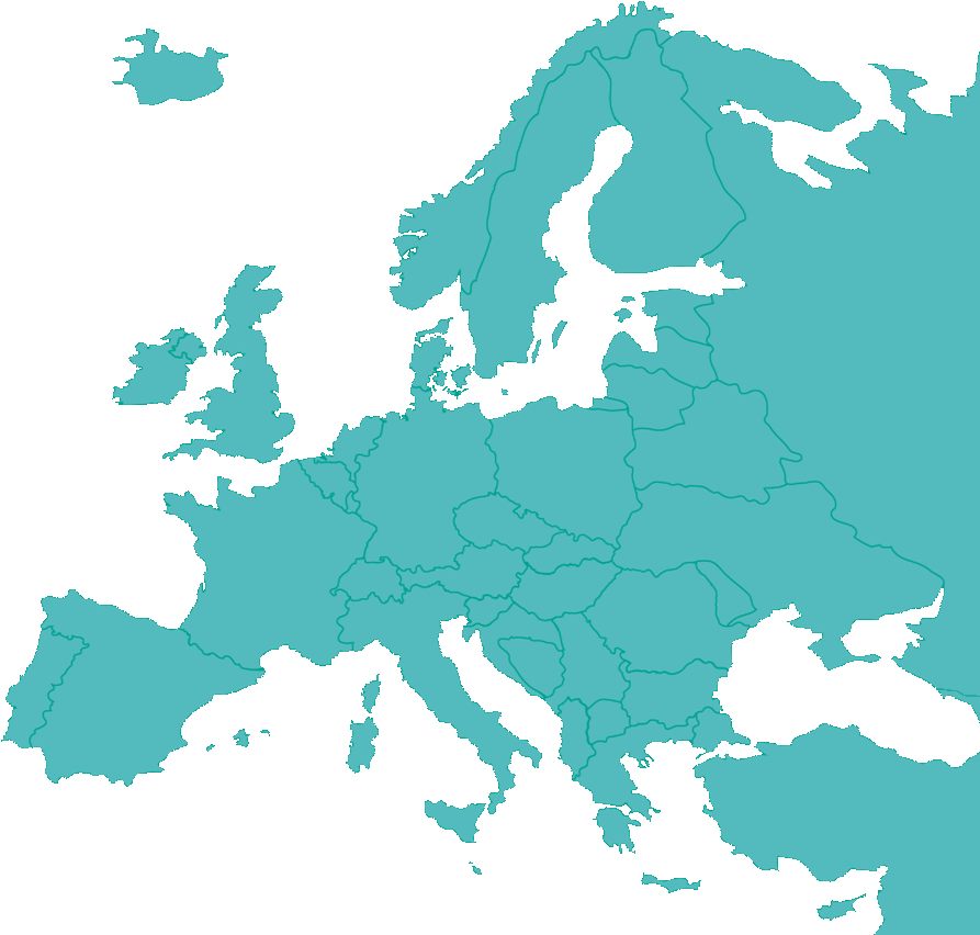 Europa